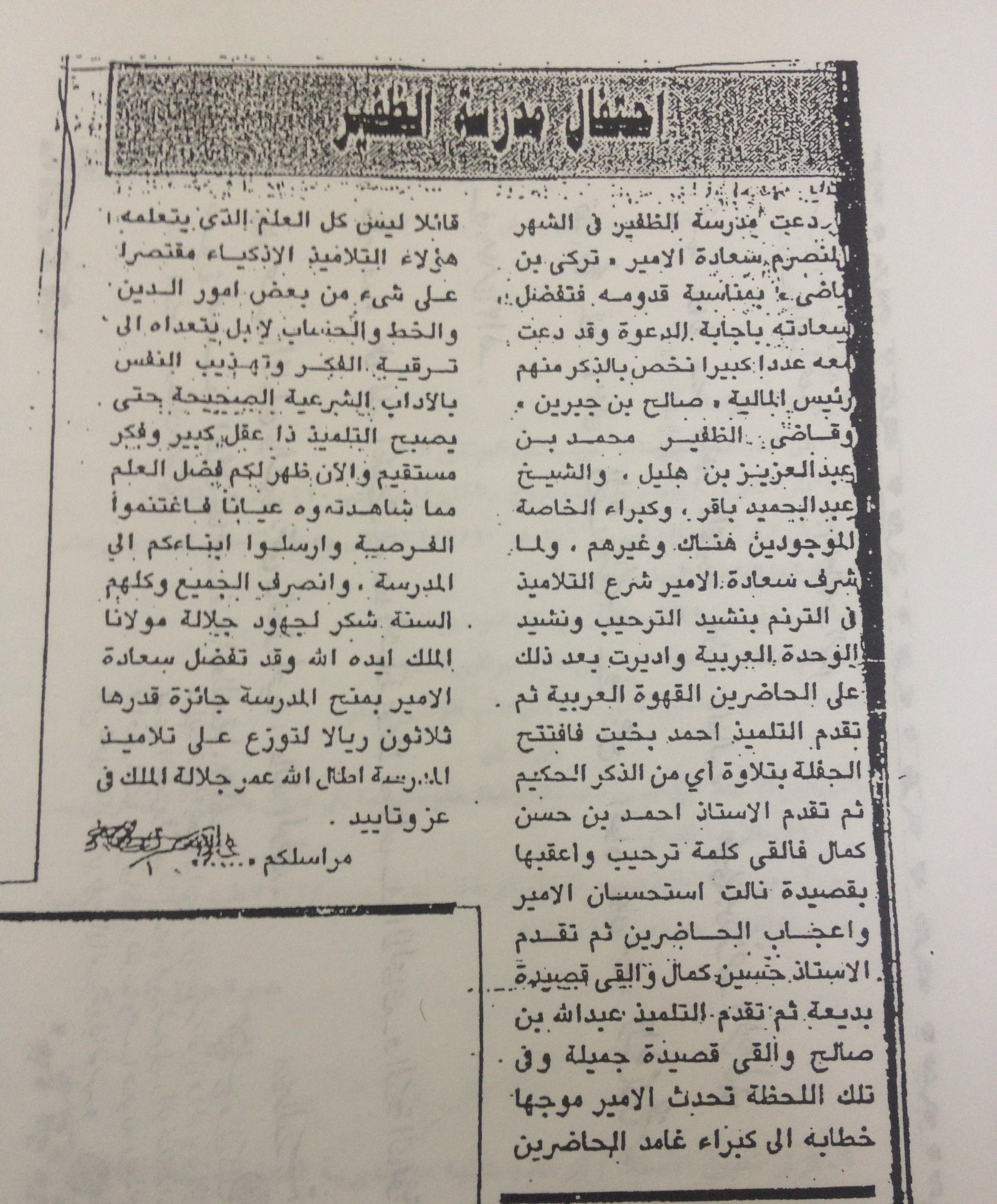 مقال لأحد الصحف عام 1353هـ تبن احتفال المدرسة بالأمير تركي بن ماضي –أمير الظفير انذاك